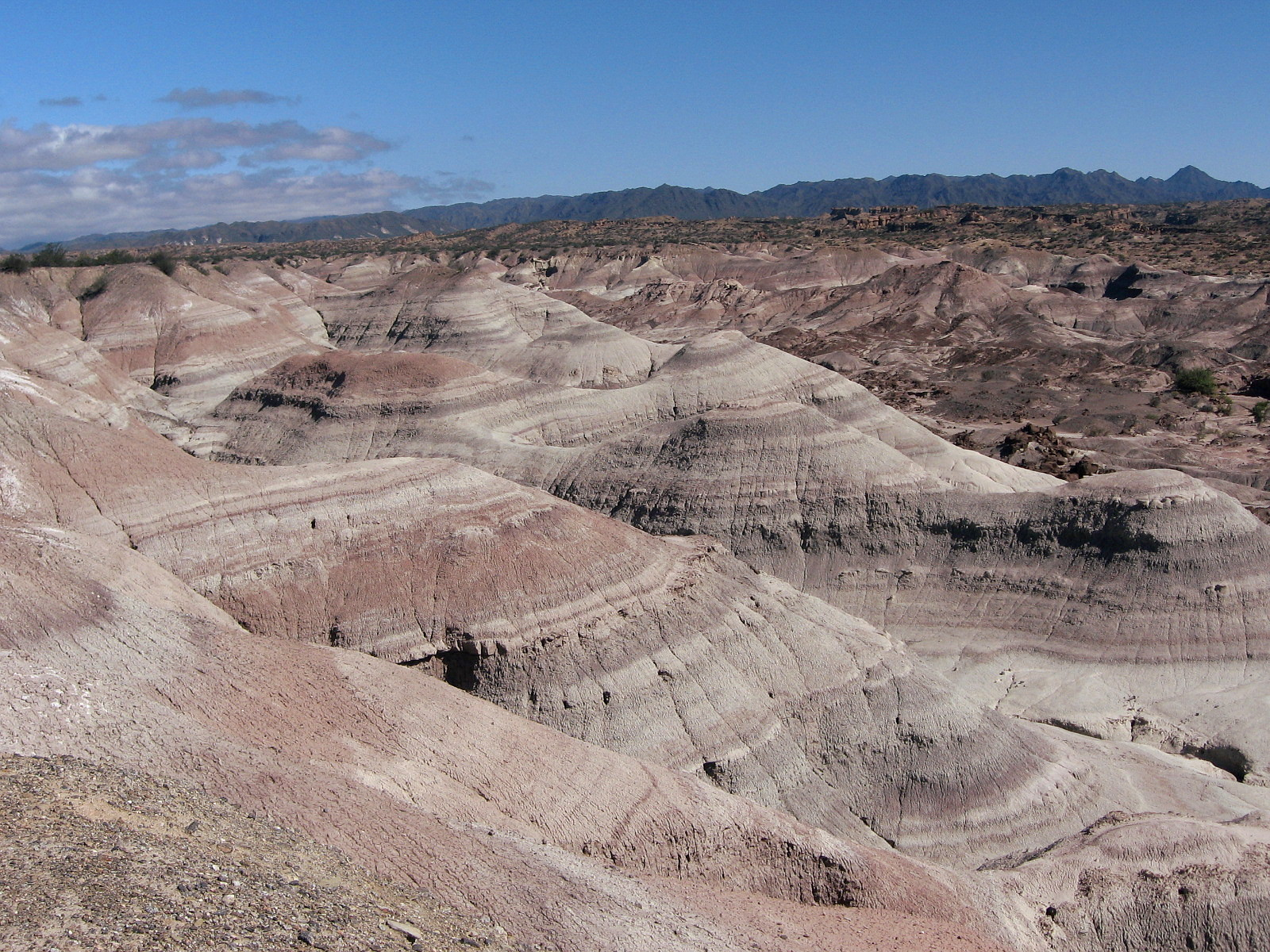 Valle Pintado - Parque Provincial Ischigualasto (Valle de la Luna)